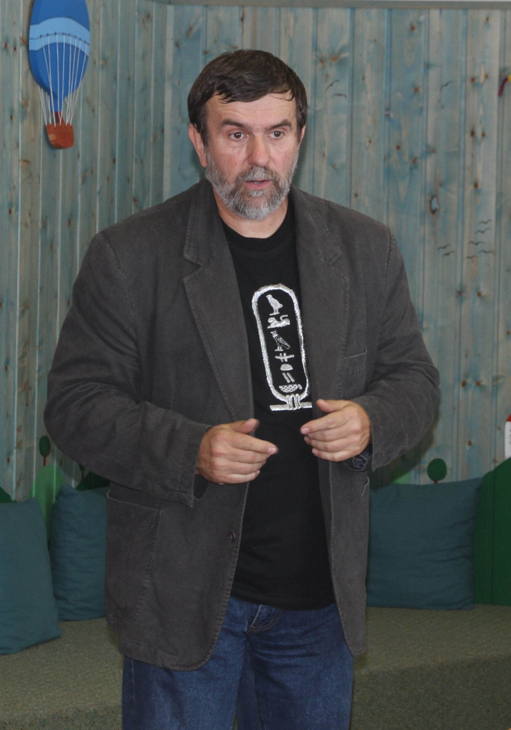 Vlastimil Vondruška - beseda v Knihovně města Plzně 3. října 2011